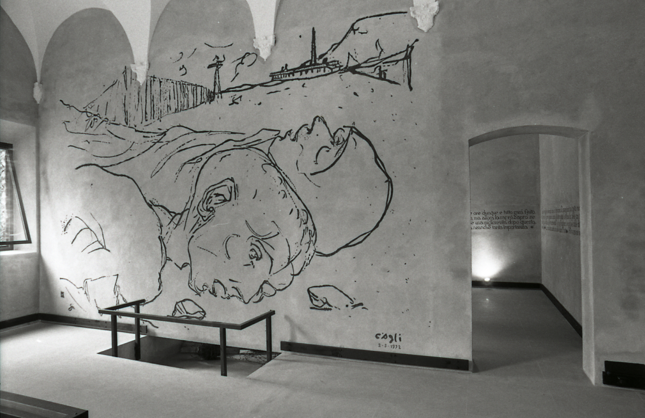 Servizio fotografico : Carpi, 1973 / Paolo Monti. - Strisce: 7, Fotogrammi complessivi: 35 : Negativo b/n, gelatina bromuro d'argento/ pellicola ; 35 mm. - ((Sul portanegativi: N[I]K[MA]T FP4 iscrizione inventariale manoscritta a pennarello verde "2438". - Il fotogramma n. 18 è leggermente tagliato nella seconda metà. - Il museo è stato inaugurato il mese di ottobre del 1973. - Occasione: Documentazione del nuovo Museo progettato dallo studio BBPR. - Fonte: Agenda di Paolo Monti: Leica 1501-3000 Controllo numerazione (1950-1978), presso Archivio Paolo Monti. - Fonte: Monografia di Orlandi, Piero: Museo monumento al deportato politico e razziale nei campi di sterminio nazisti: Carpi, Castello dei Pio, Sesto San Giovanni, G. Beveresco (1973). - Fonte: Fattura di Paolo Monti: IV. Commesse/ Fattura (1972/11/14), presso Archivio Paolo Monti